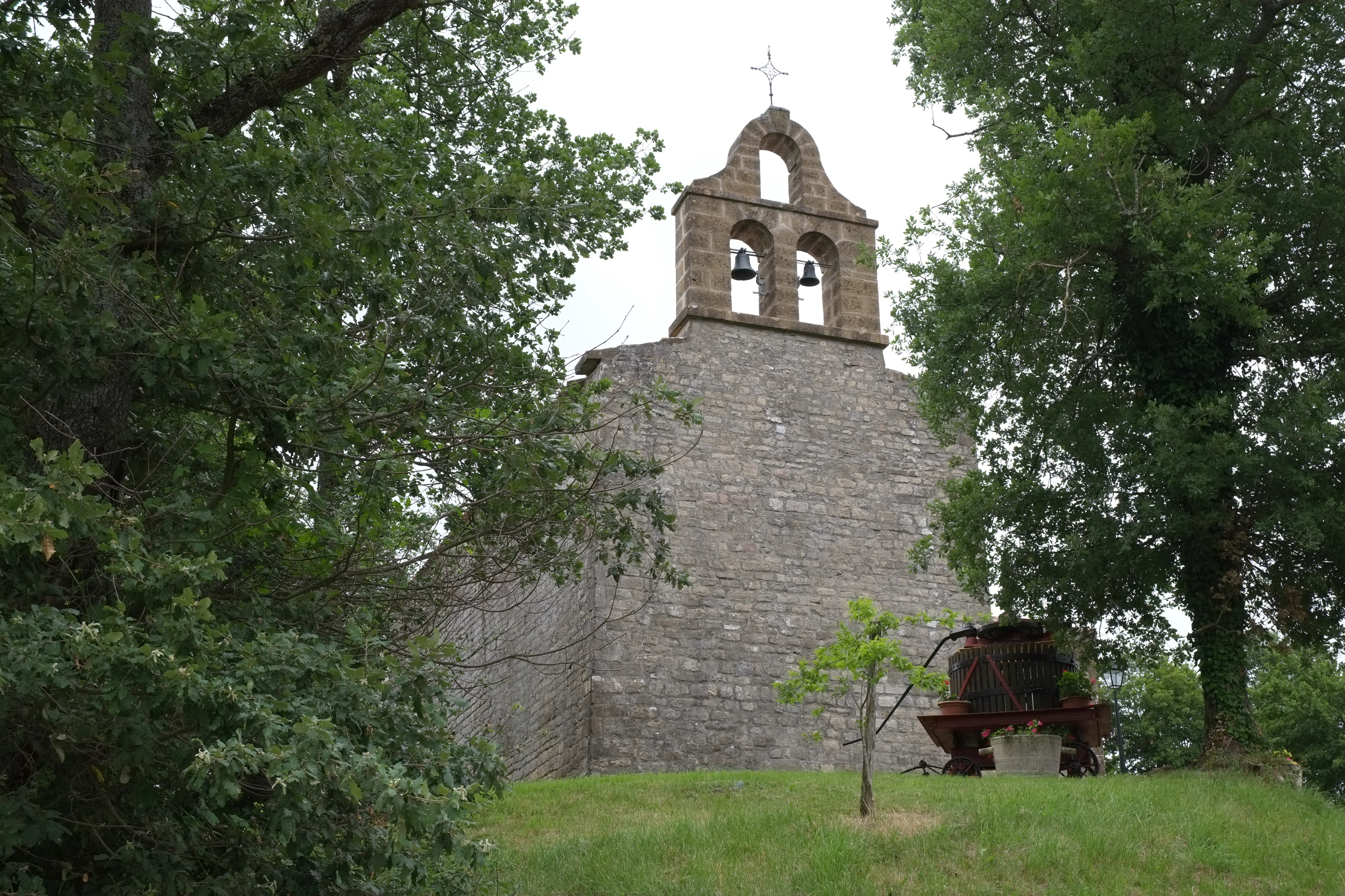 Kirche in Gueytes-et-Labastide (Frankreich)